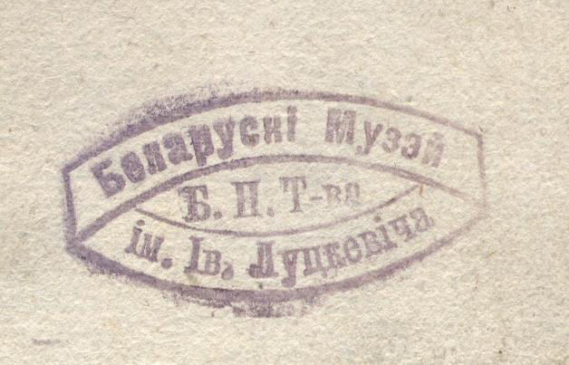 Віленскі беларускі музей імя Івана Луцкевіча. Экслібрыс